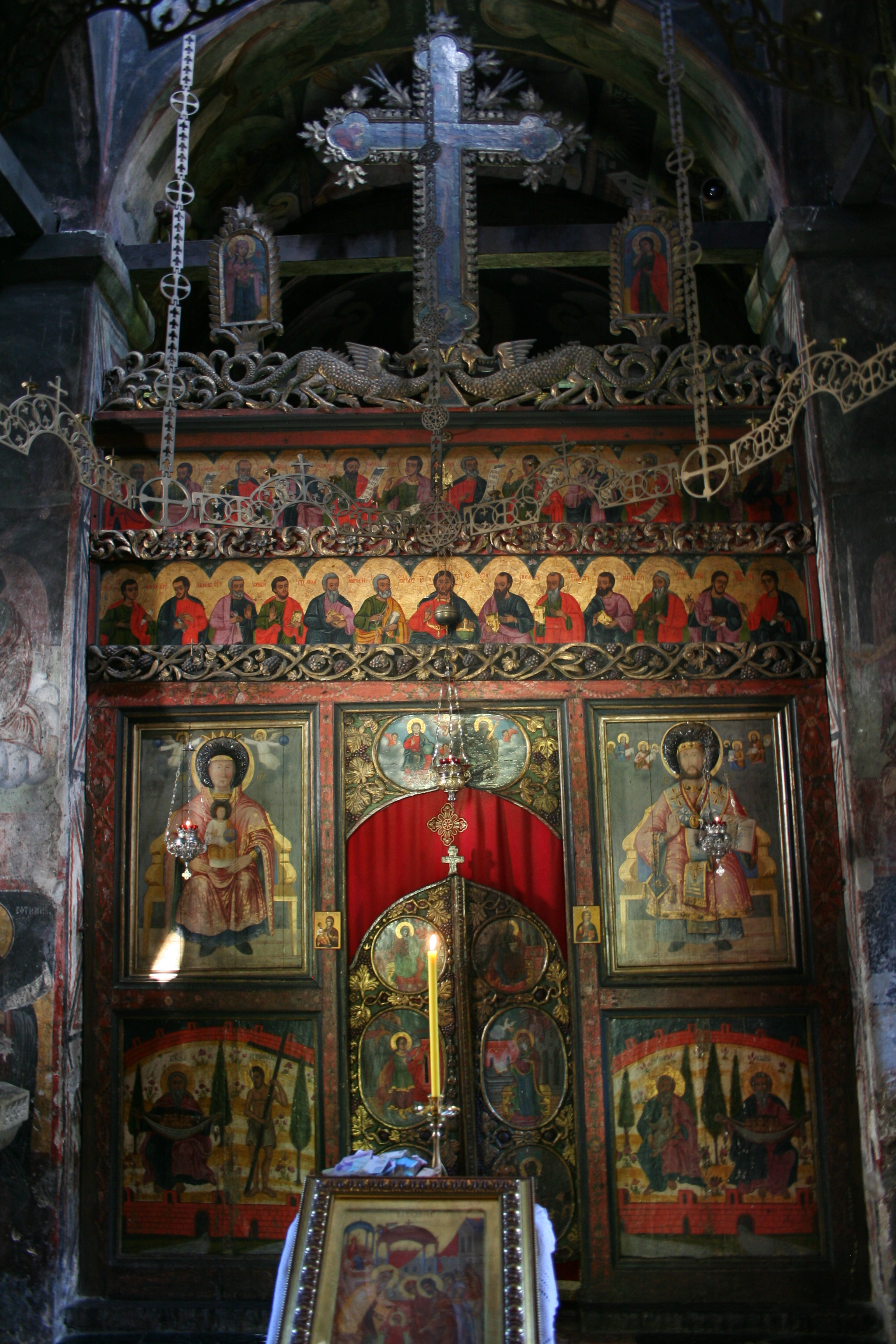 Manastir Tronoša